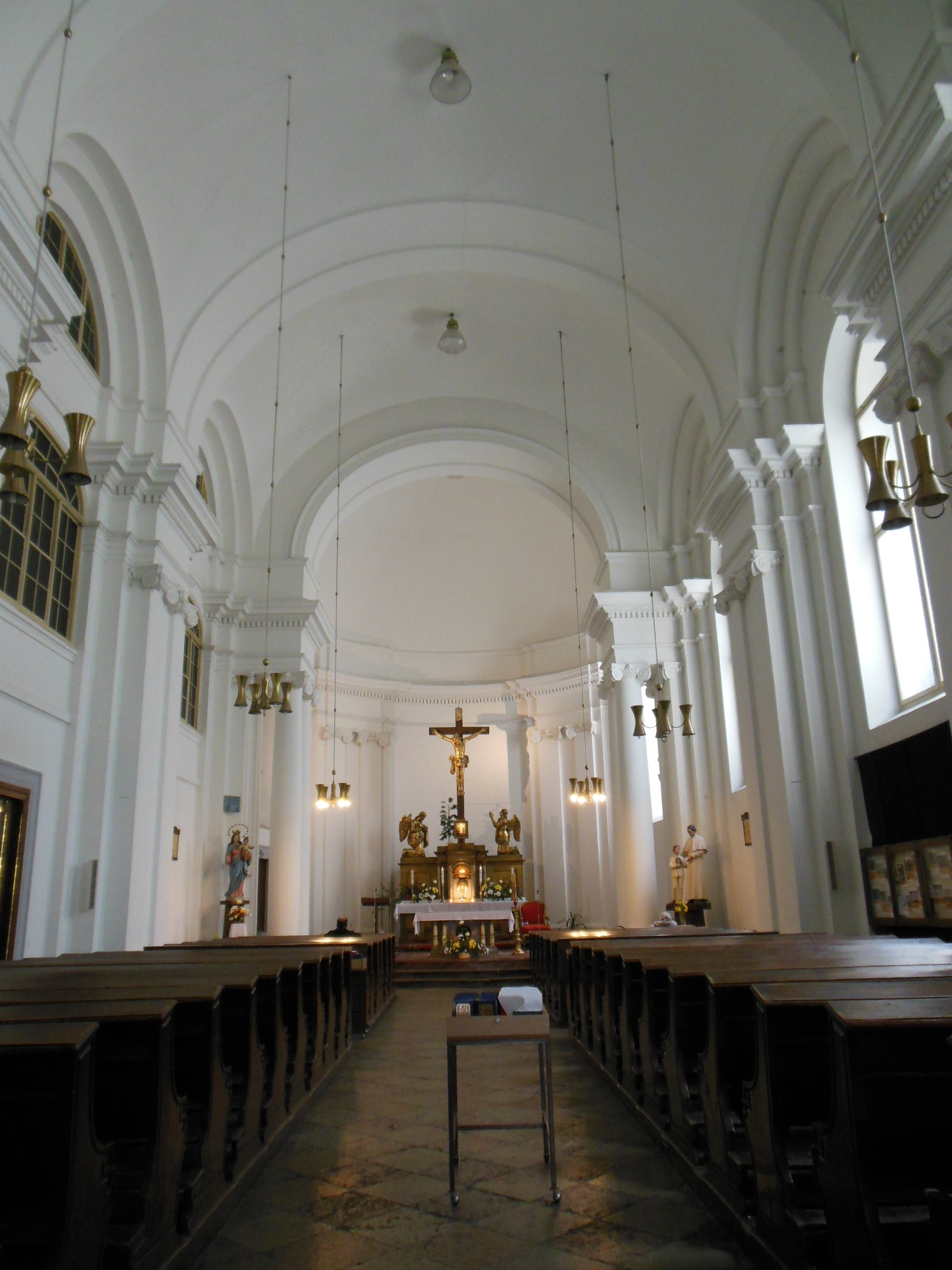 Interiér kostela svatého Kříže na rohu ulic Na Příkopě a Panská v Praze.